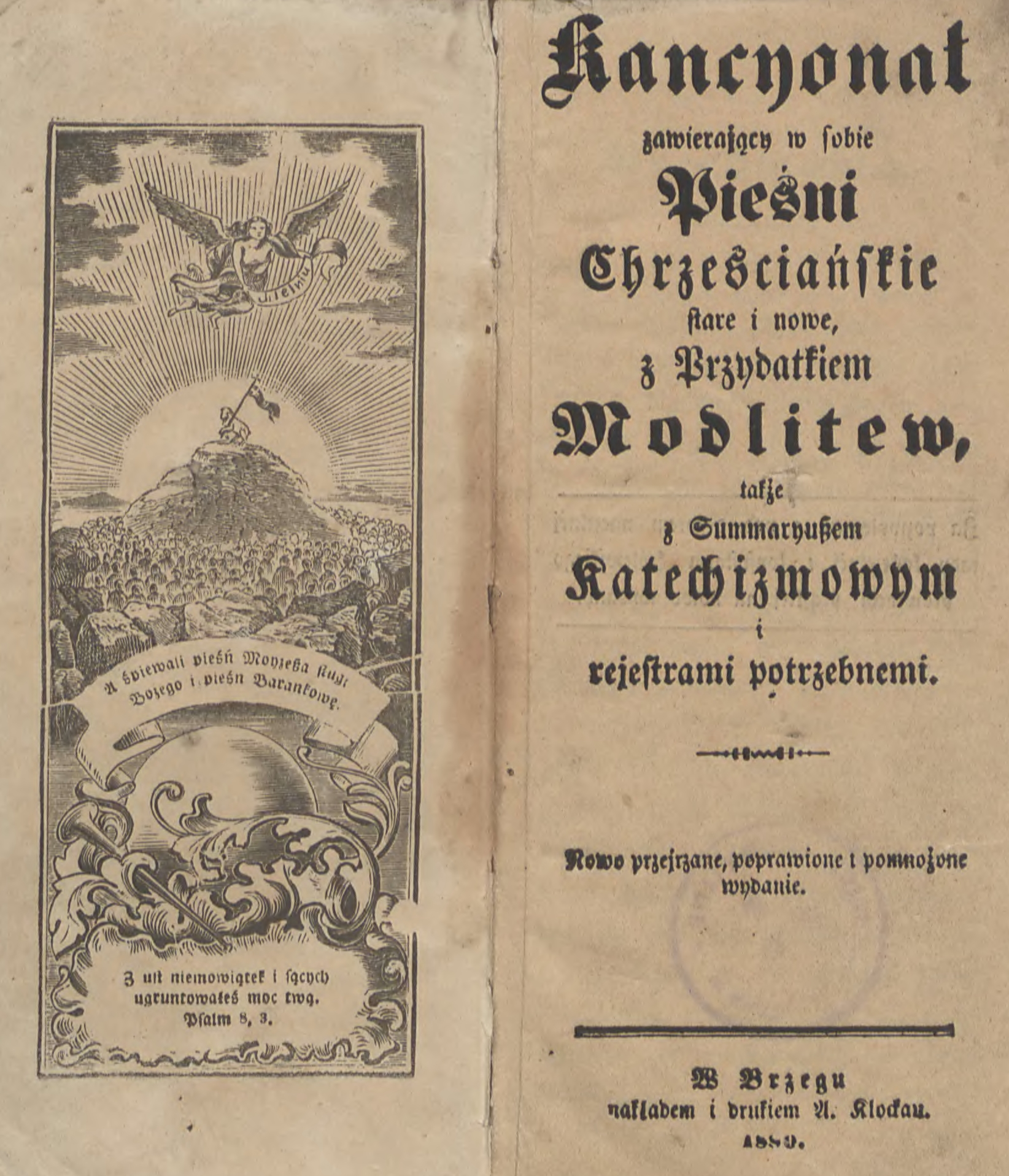 Kancjonał wydany w Brzegu w 1889 roku.